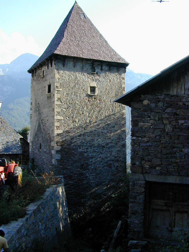 Torre defensiva con tejado a cuatro aguas